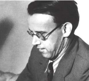 Виктор Яковлевич Евсеев (1910—1986) — советский учёный-финно-угровед, фольклорист